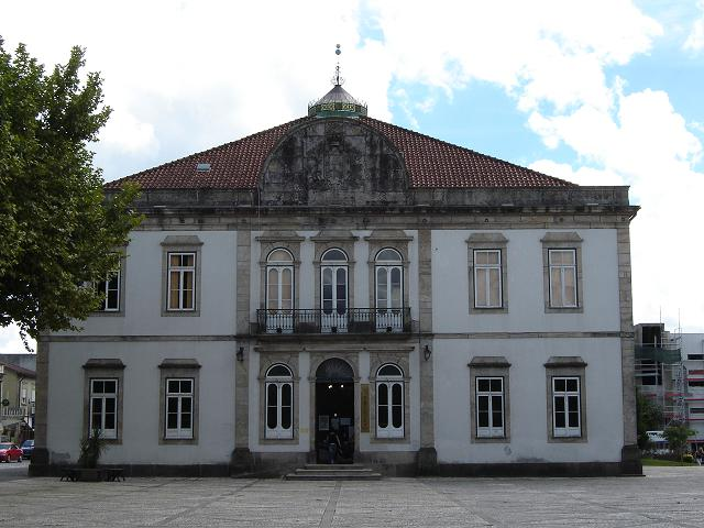 Biblioteca de Vila Verde, Portugal.